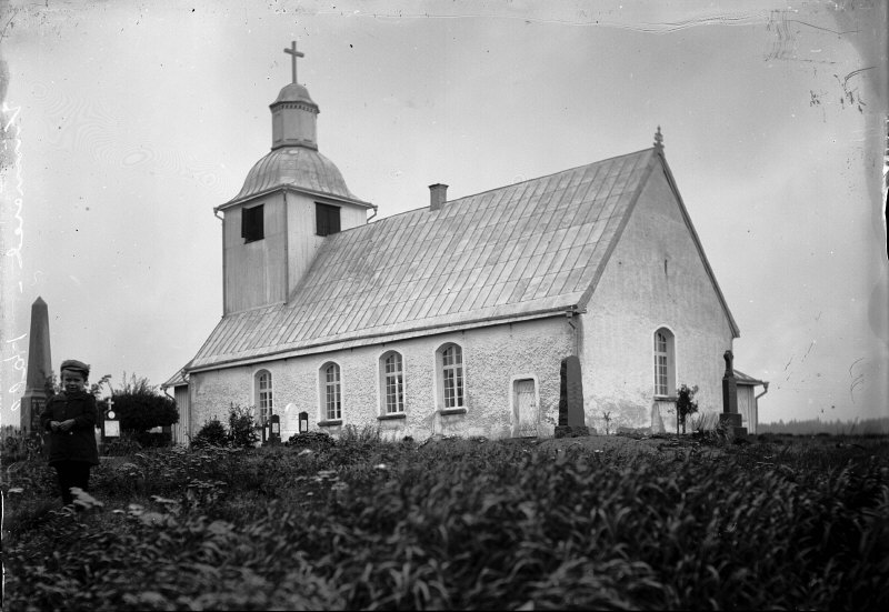 Kyrkan från sydöst. Kategori: (01) ExteriörerKyrkan från sydöst.